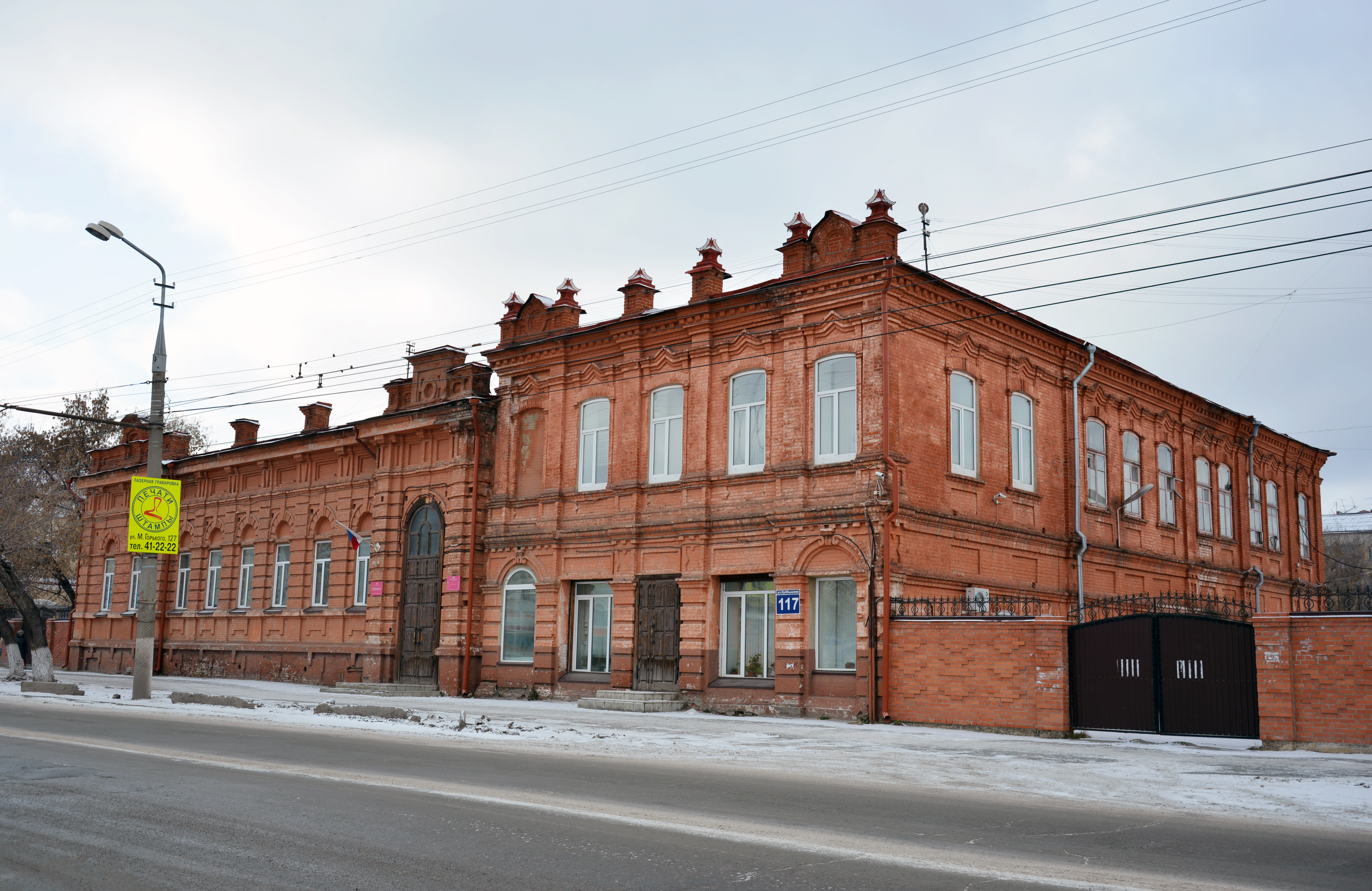 Дома купцов А.Д.Смолина и Т.Е.Колесникова (Курганская область, Курган, улица Куйбышева, 117)